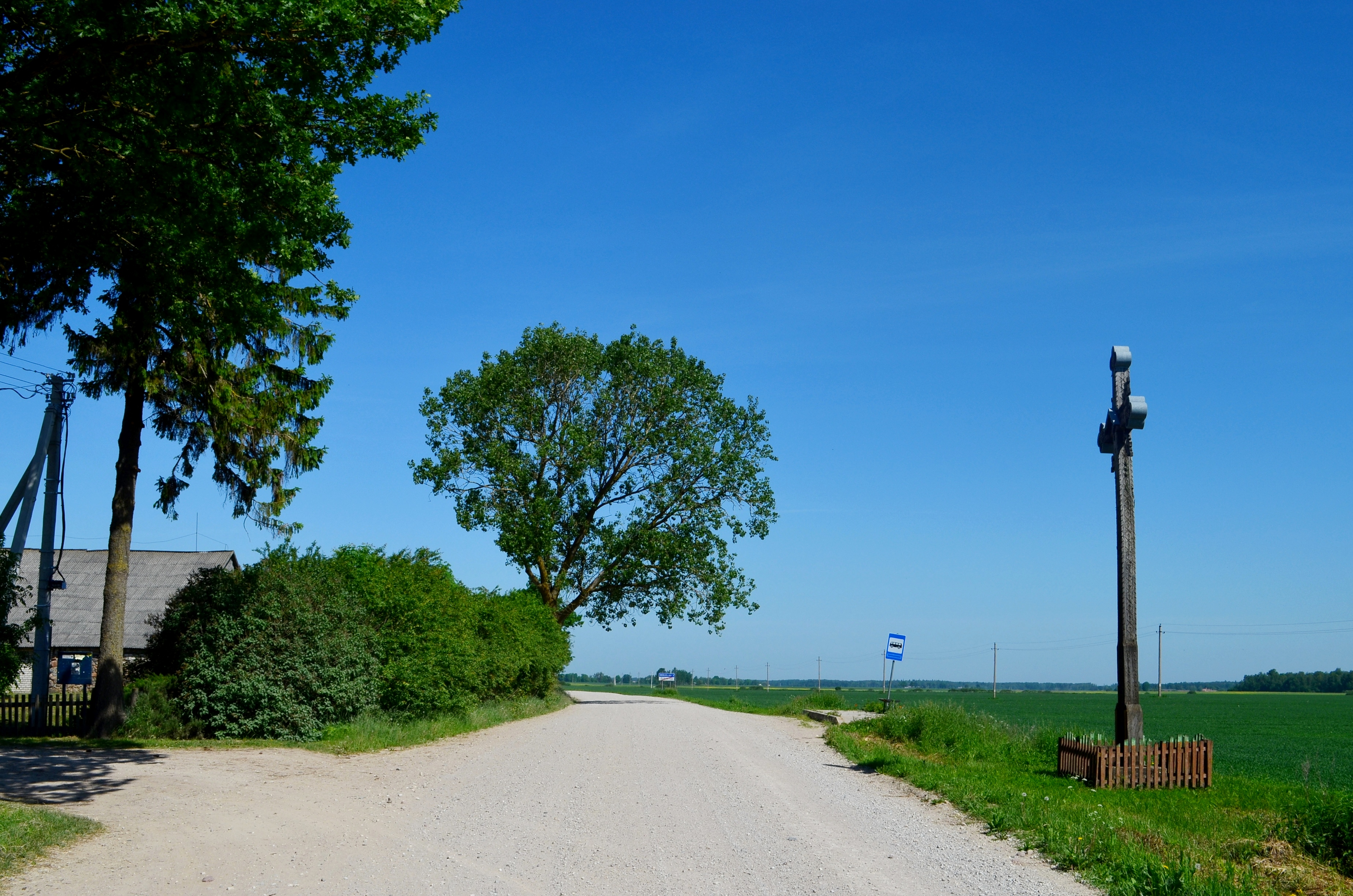 Žybartai, Radviliškio raj.